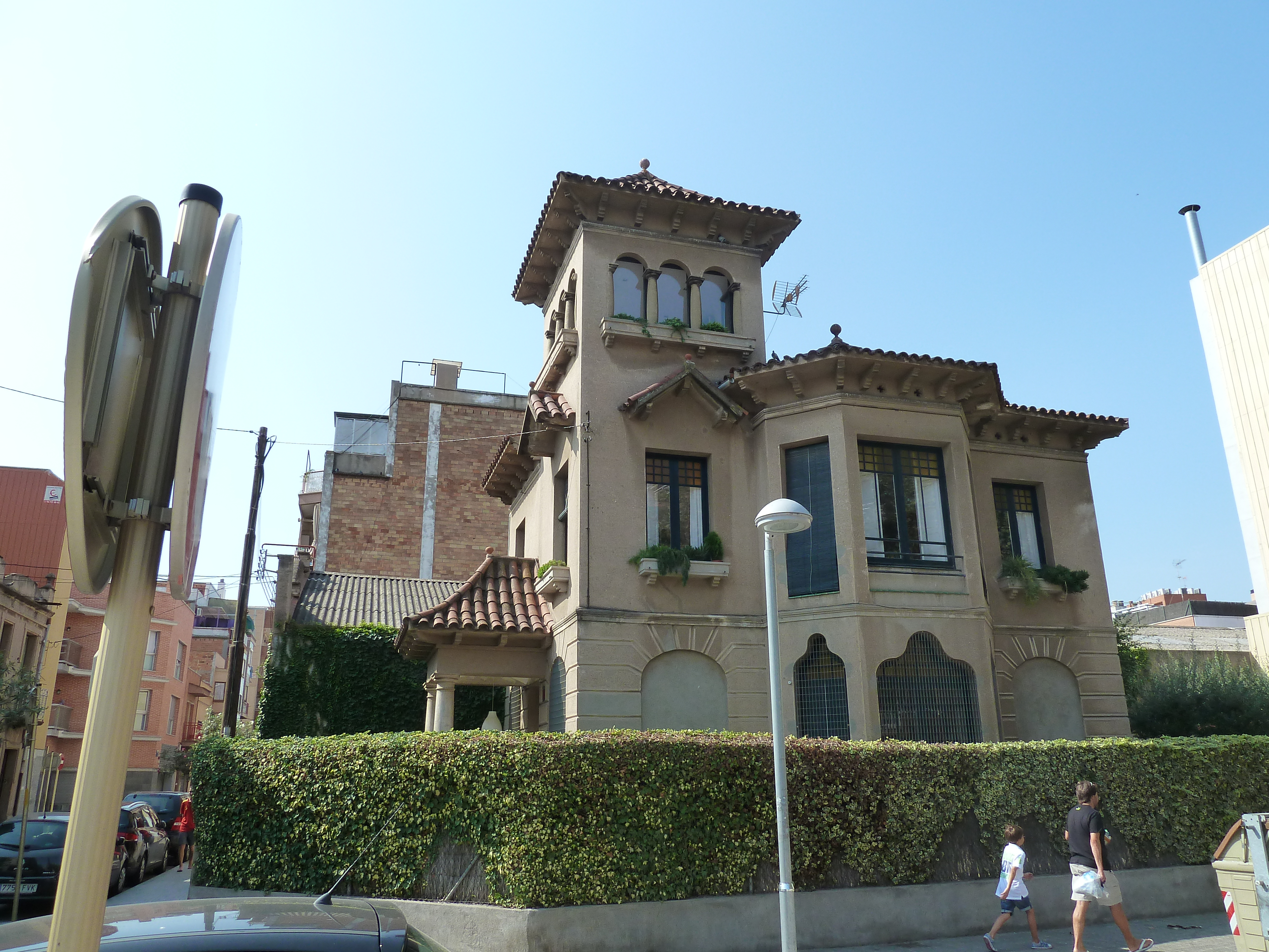 Cornellà de Llobregat